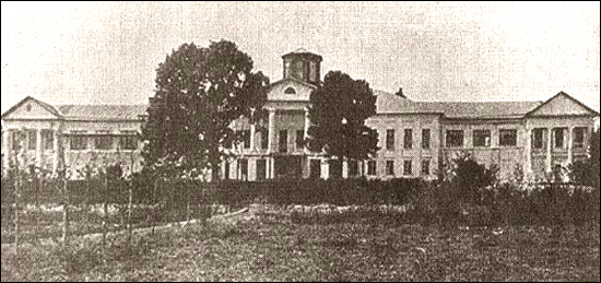 Suponev Palace in Uglich